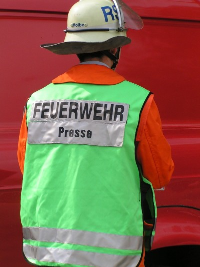 Mitarbeiter der Kreisfeuerwehr Pressegruppe (Landkreis Northeim) mit Kennzeichnungsweste